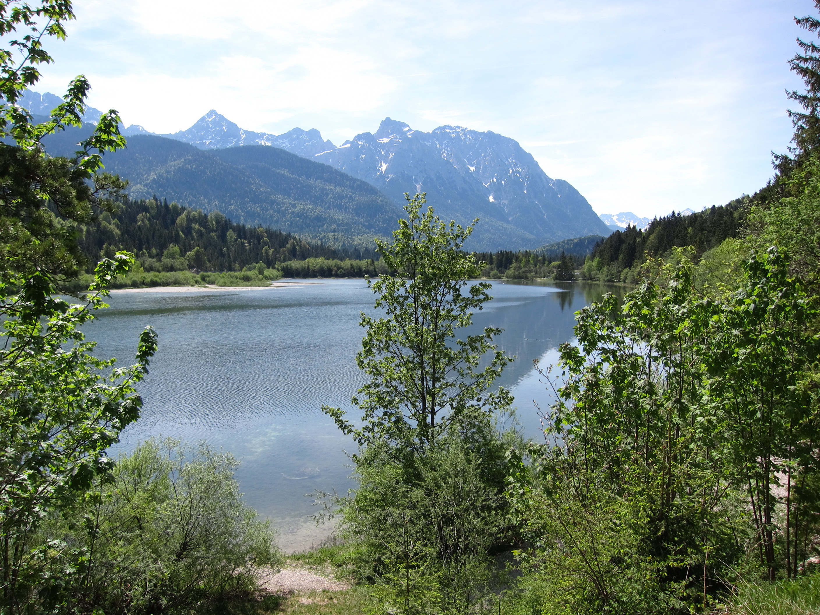 Isar-Stausee bei Krün, im Hintergrund das Karwendel